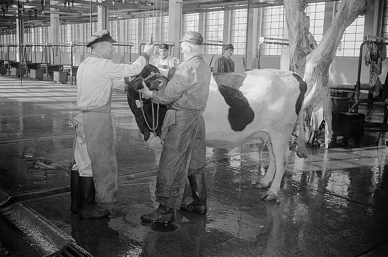 Original image description from the Deutsche FotothekBetäuben eines Rindes